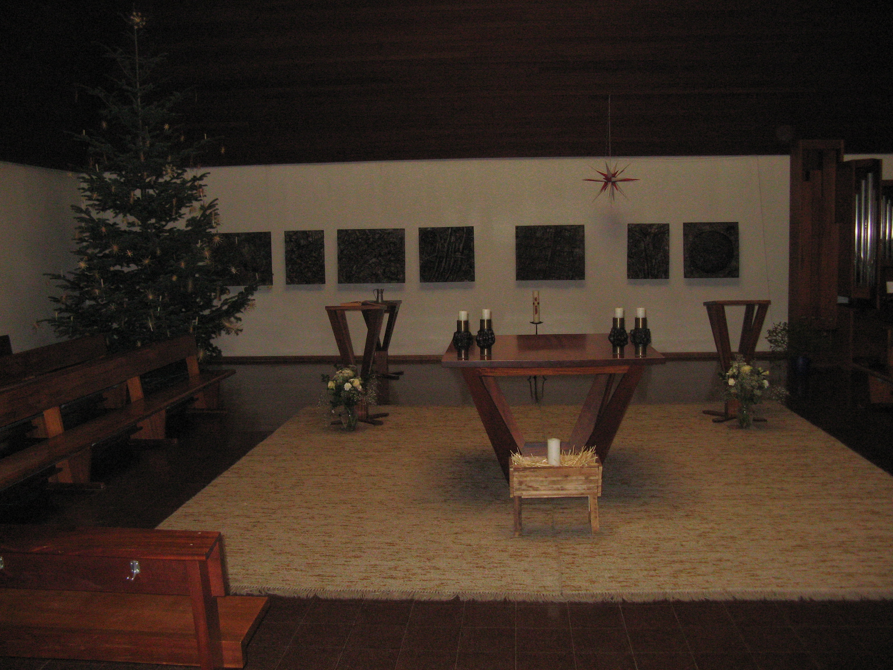 Innenraum der Evangelischen Pfarrkirche Hetzendorf (1972) von Rudolf Angelides in Wien-Meidling